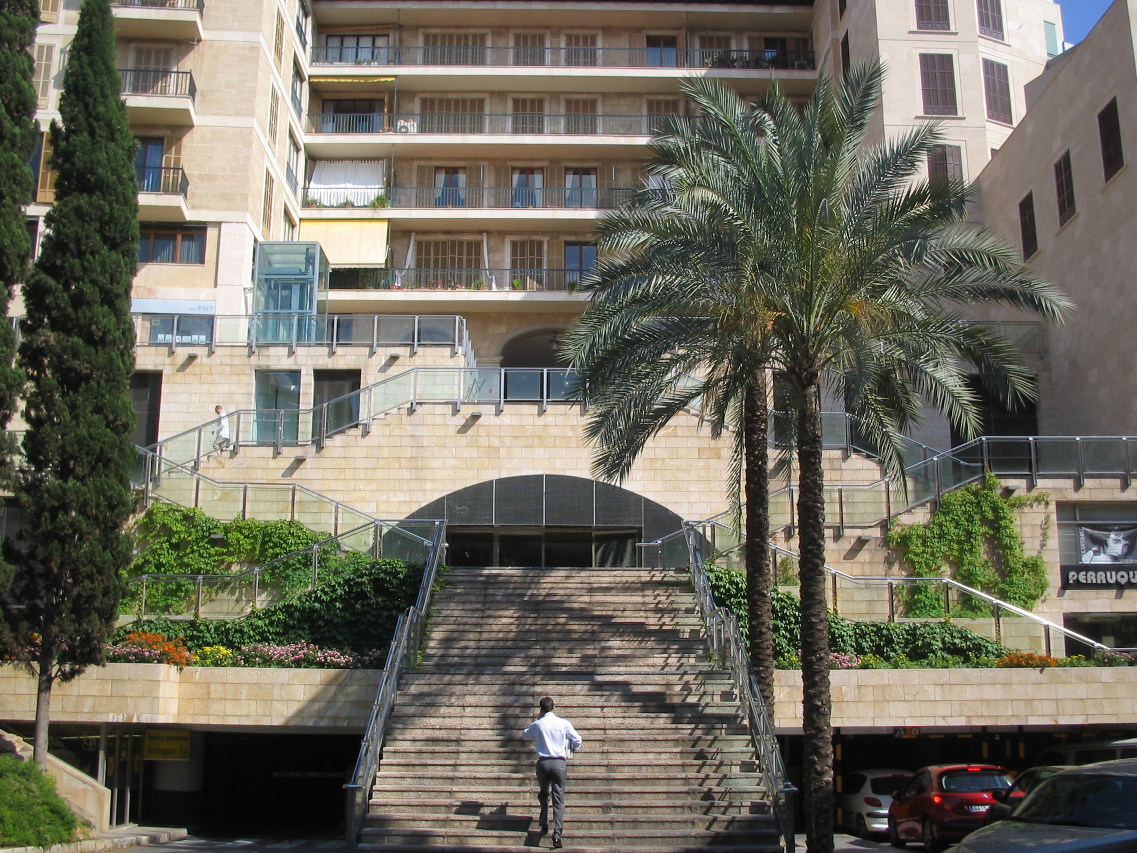 Escaleras hacia la plaza mayor en Palma de Mallorca